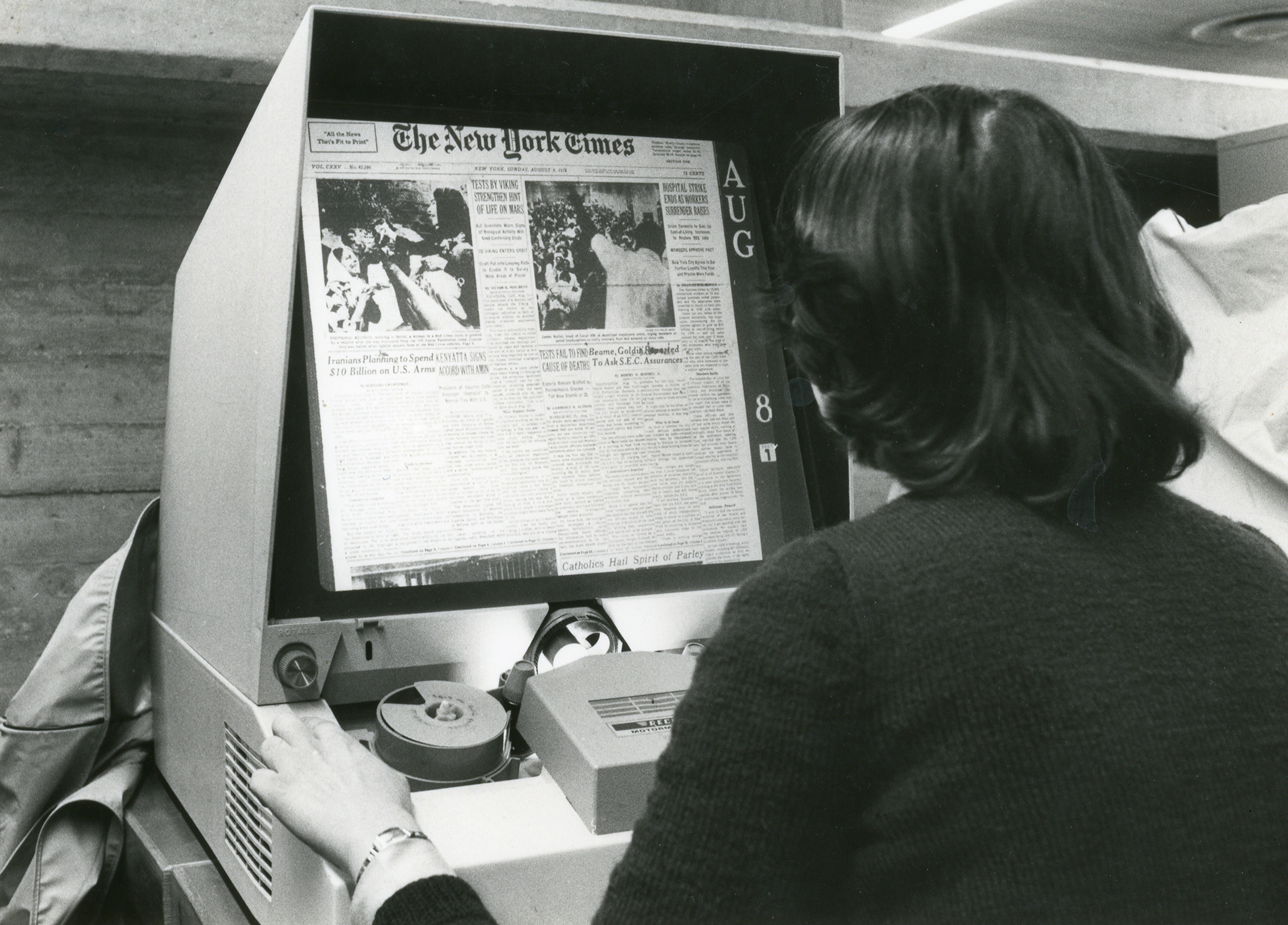 "Technology_p4" מתוך התערוכה "הספרייה: מבט לאחור עם הפנים קדימה" (2011) ; פריט מספר From the display "The Library : A Glance at the Past, Facing the Future" (2011) ; Item number "Technology_p4"